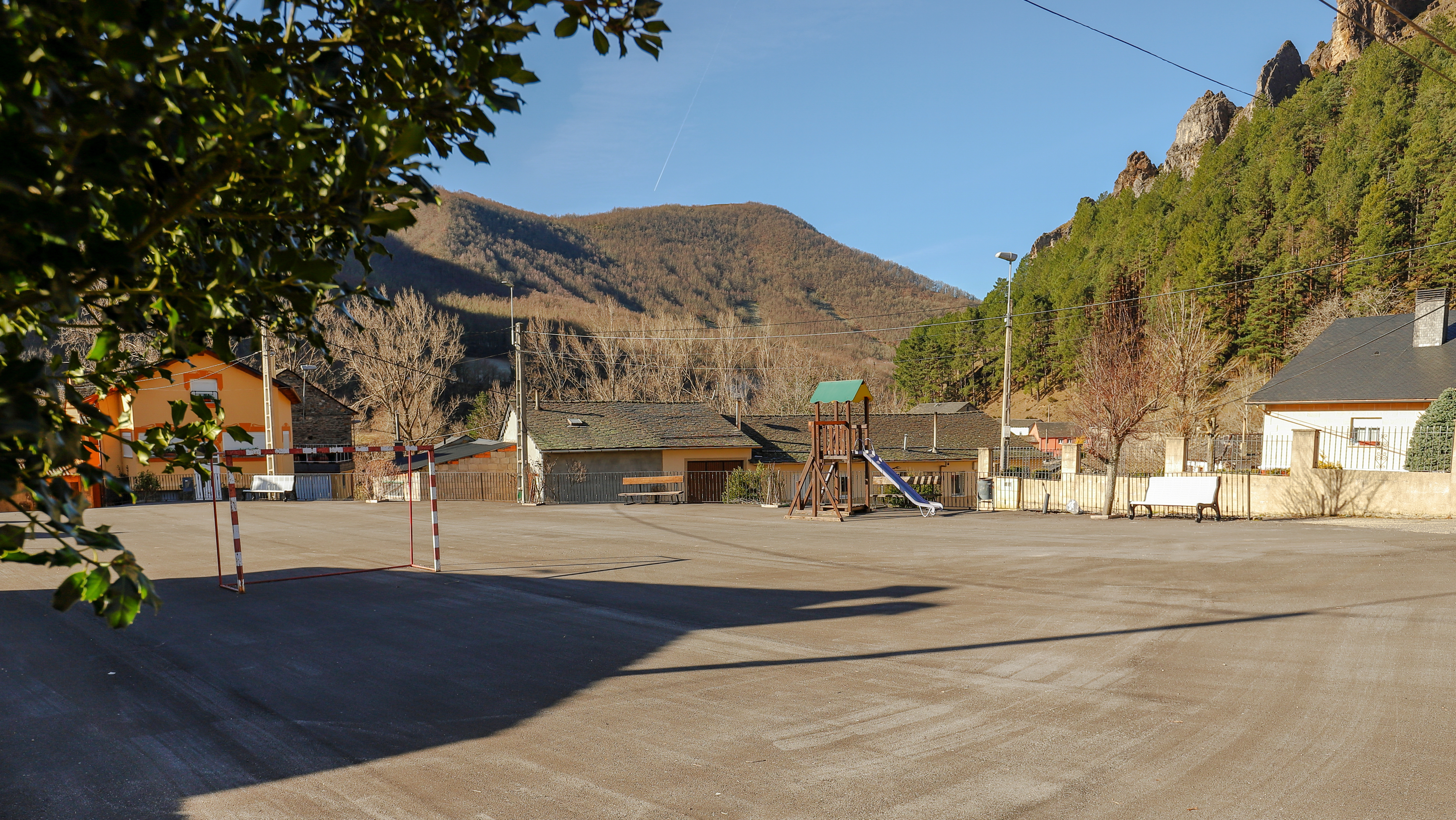 Mataotero es una localidad que pertenece al municipio de Palacios del Sil, en la comarca de El Bierzo, provincia de León.